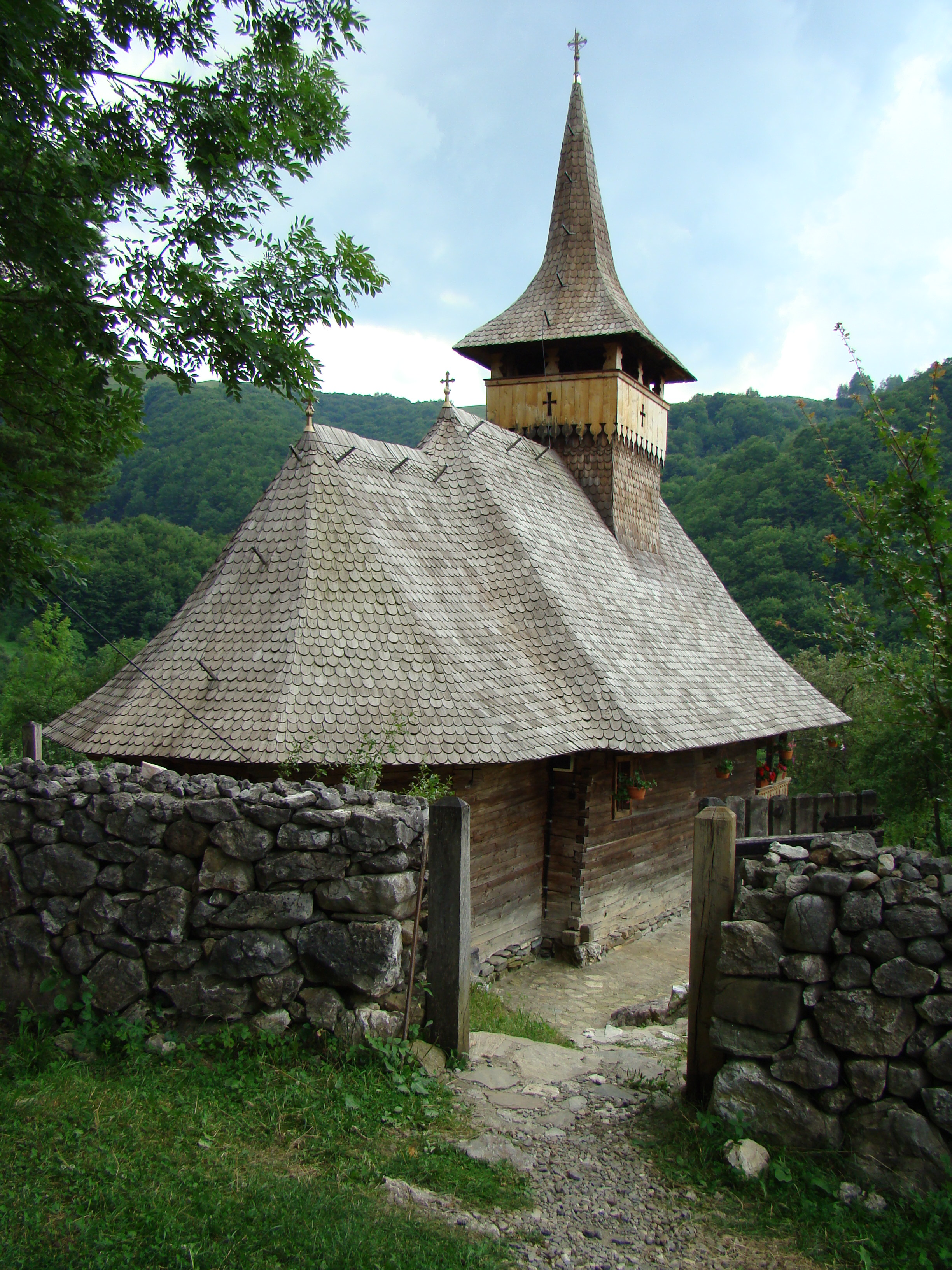 Biserica de lemn „Sf.Cuvioasă Paraschiva” Sub Piatră-Alba